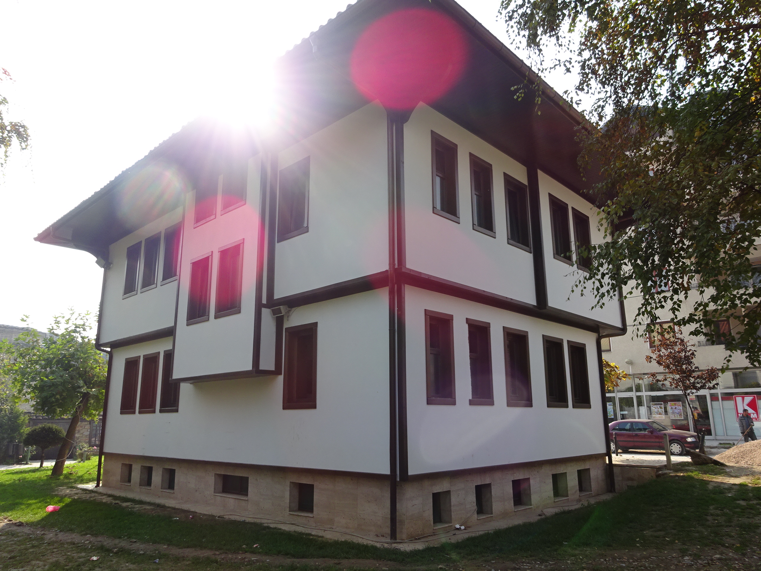 Стари куќи во Тетово Ова е фотографија на споменик на културата во Македонија со типски код: B05This is a a photo of a cultural monument in North Macedonia with type id: B05